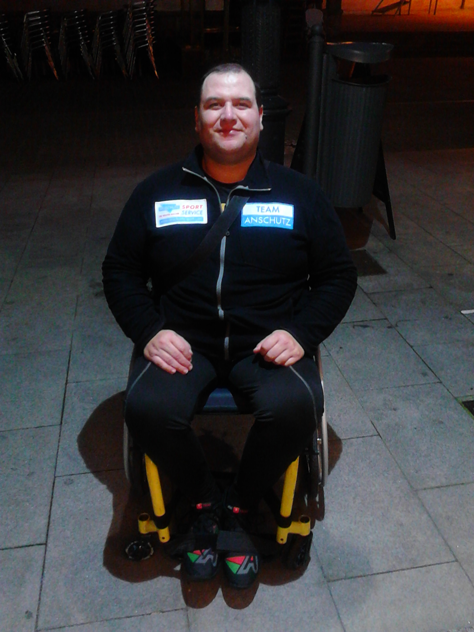 Iván Lindín Rodil, en Ribadeo o 29 de novembro de 2018